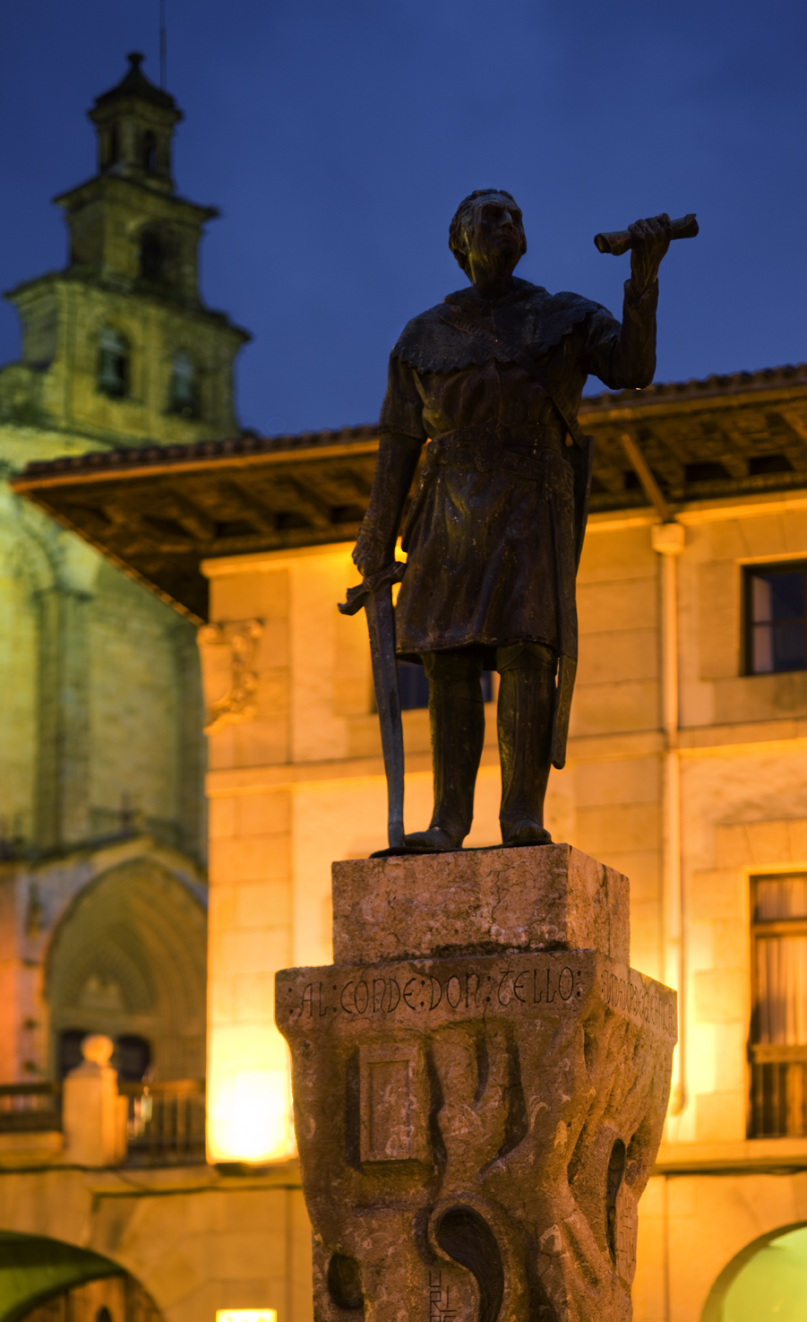 Tello kontea